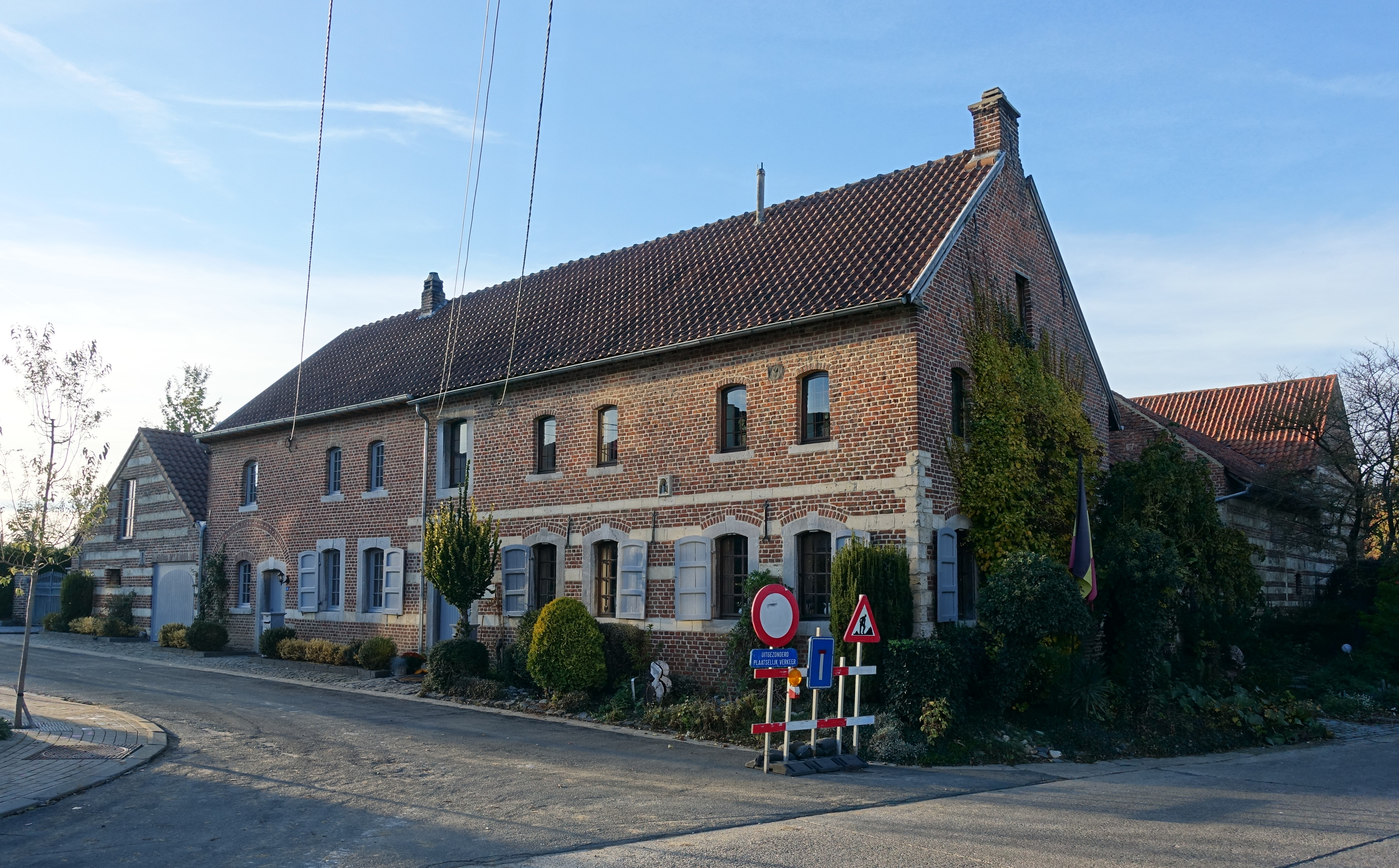 Voormalig 17de-eeuws tolhuis aan de voormalige Romeinse steenweg